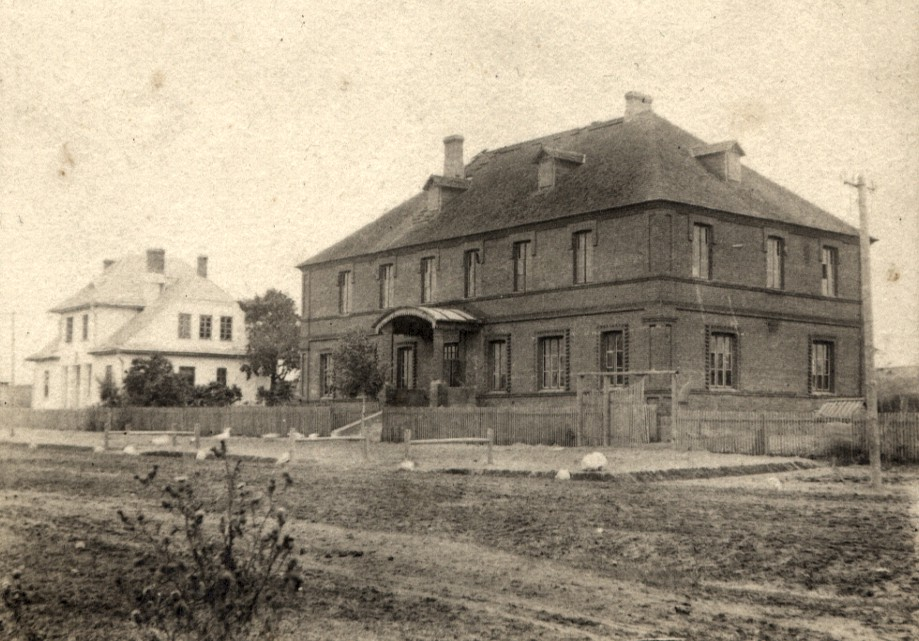 Беларуская (тарашкевіца): Карэлічы (Kareličy), Зарэчча (Zarečča). Школа, у другім будынку цяпер ЗАГС